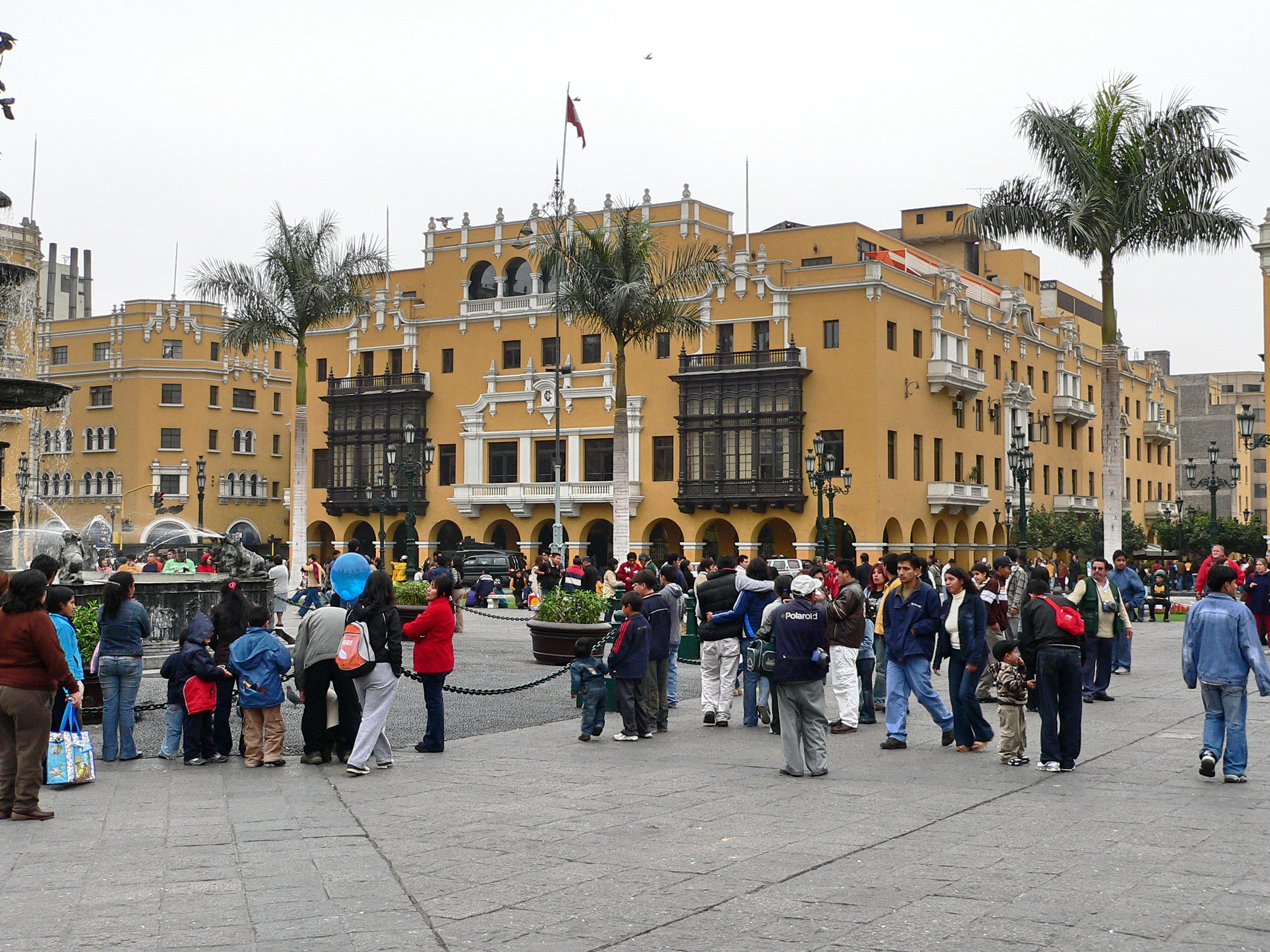 Descripción: Club de la Unión Lugar: Centro Histórico de Lima Distrito : Cercado de Lima Ciudad : Lima País : Perú Fotógrafo: © Manuel González Olaechea y Franco Fecha de la foto : 8 de julio de 2007